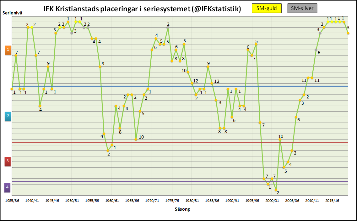 Placeringar för IFK Kristianstad